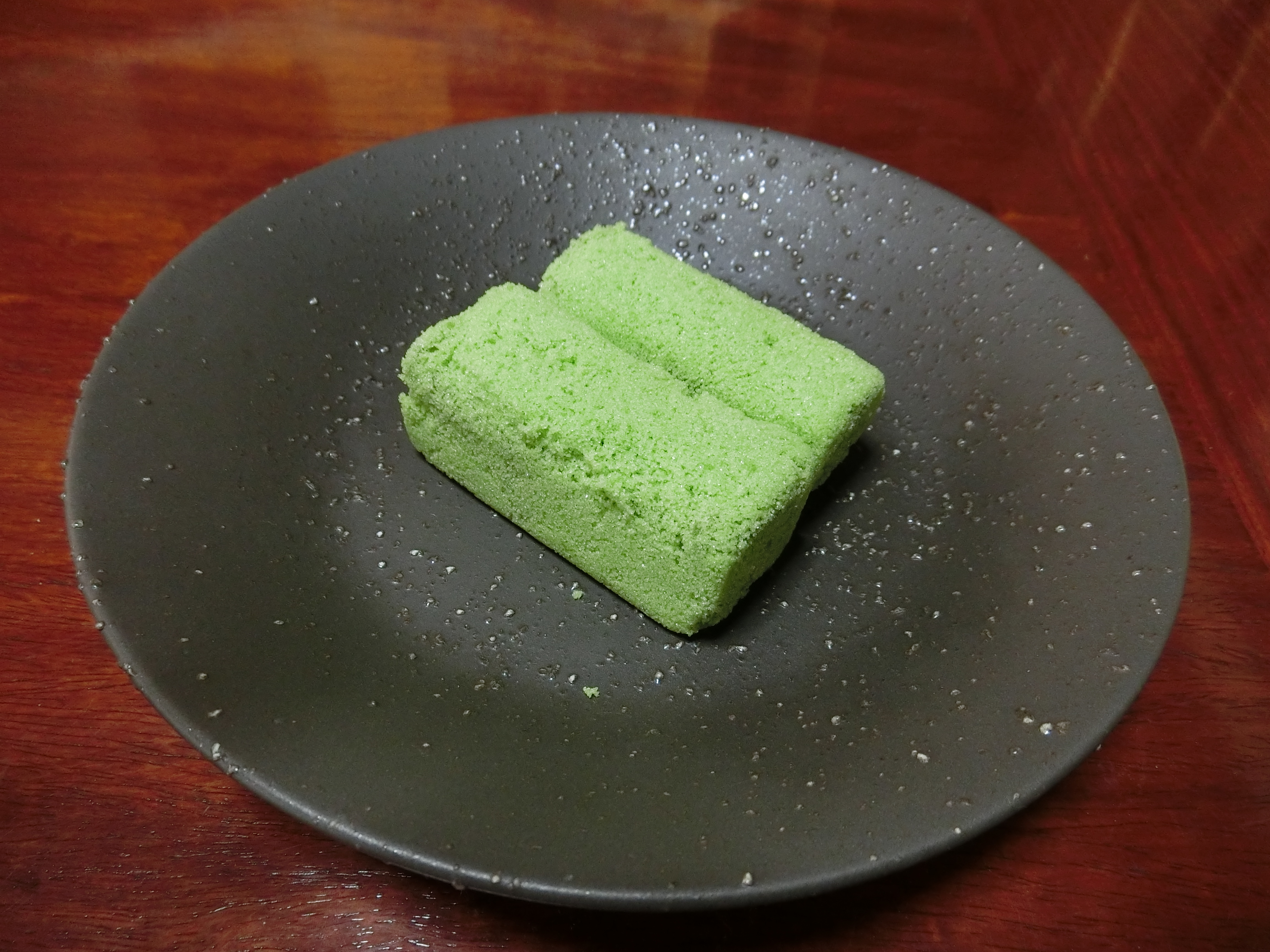 島根県松江市の銘菓